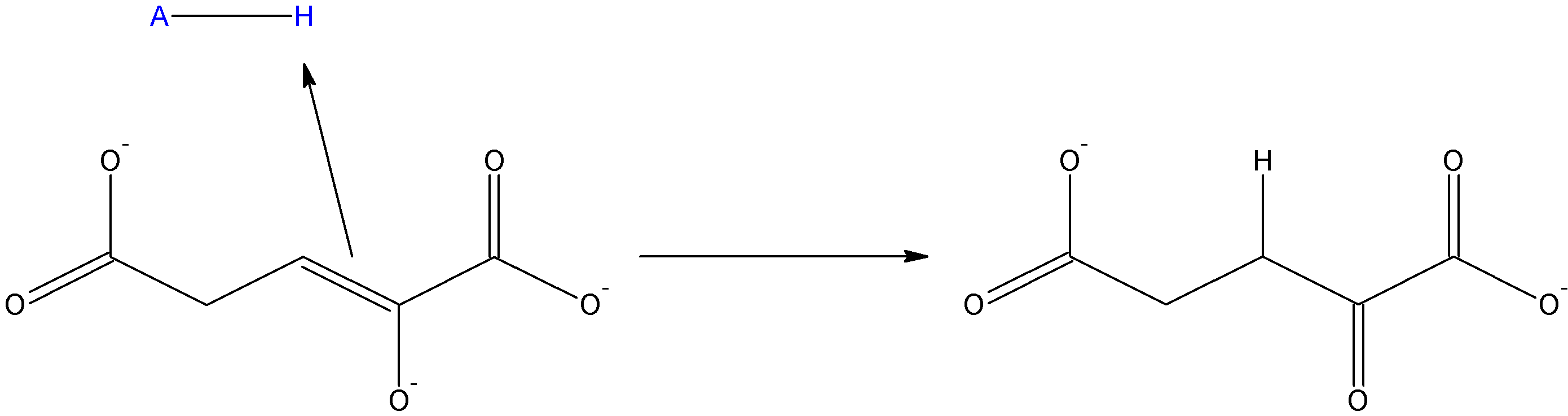 Tercera etapa de la reacción catalizada por la IDH. Realizado con ACD/ChemSketch.